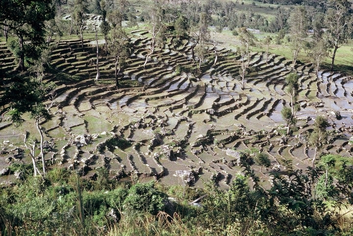 Arrozais inundados em socalcos e que após serem calcados pelos búfalos servirão para as sementeiras